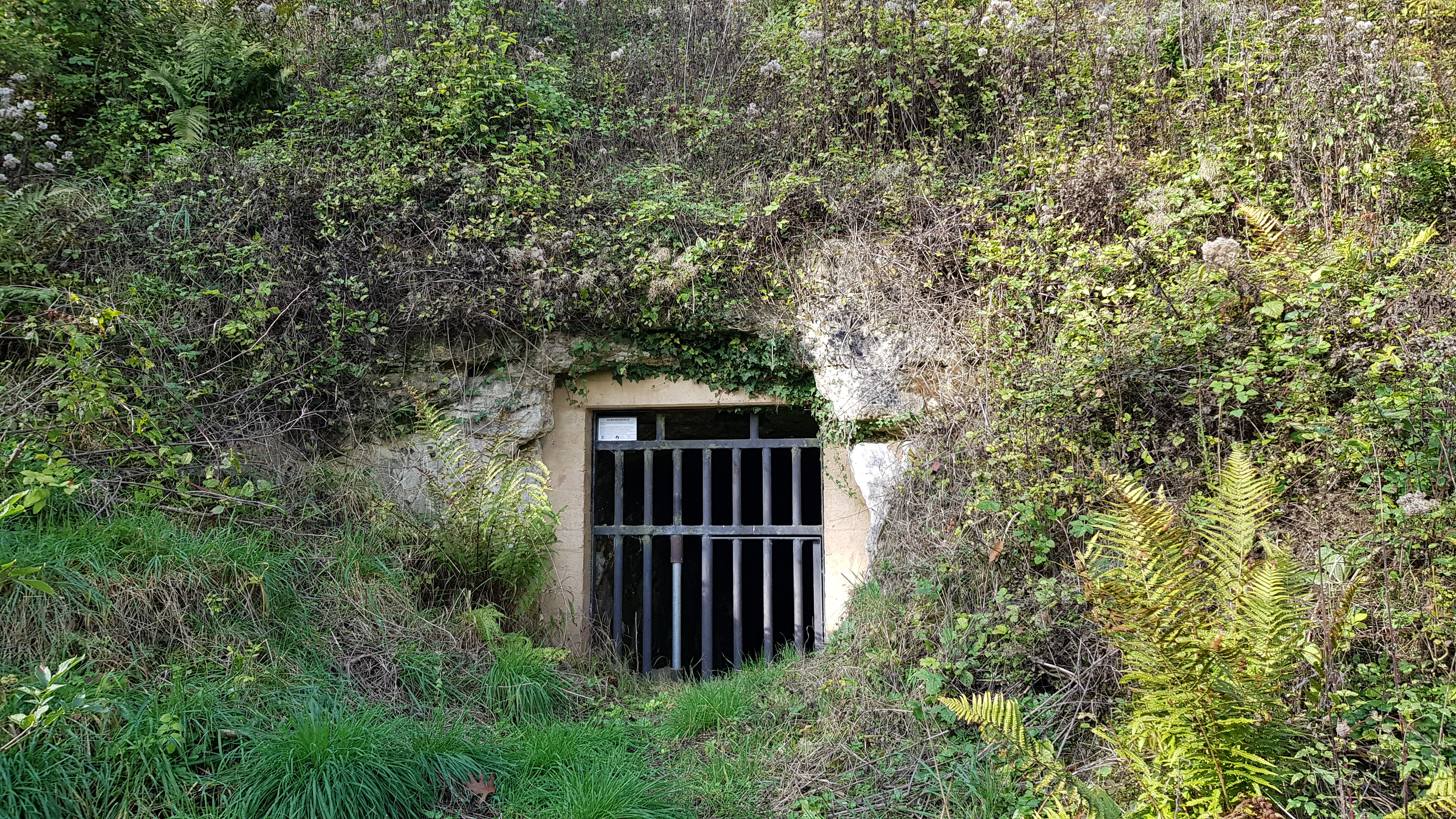 Gewandgroeve II, Valkenburg, Nederland